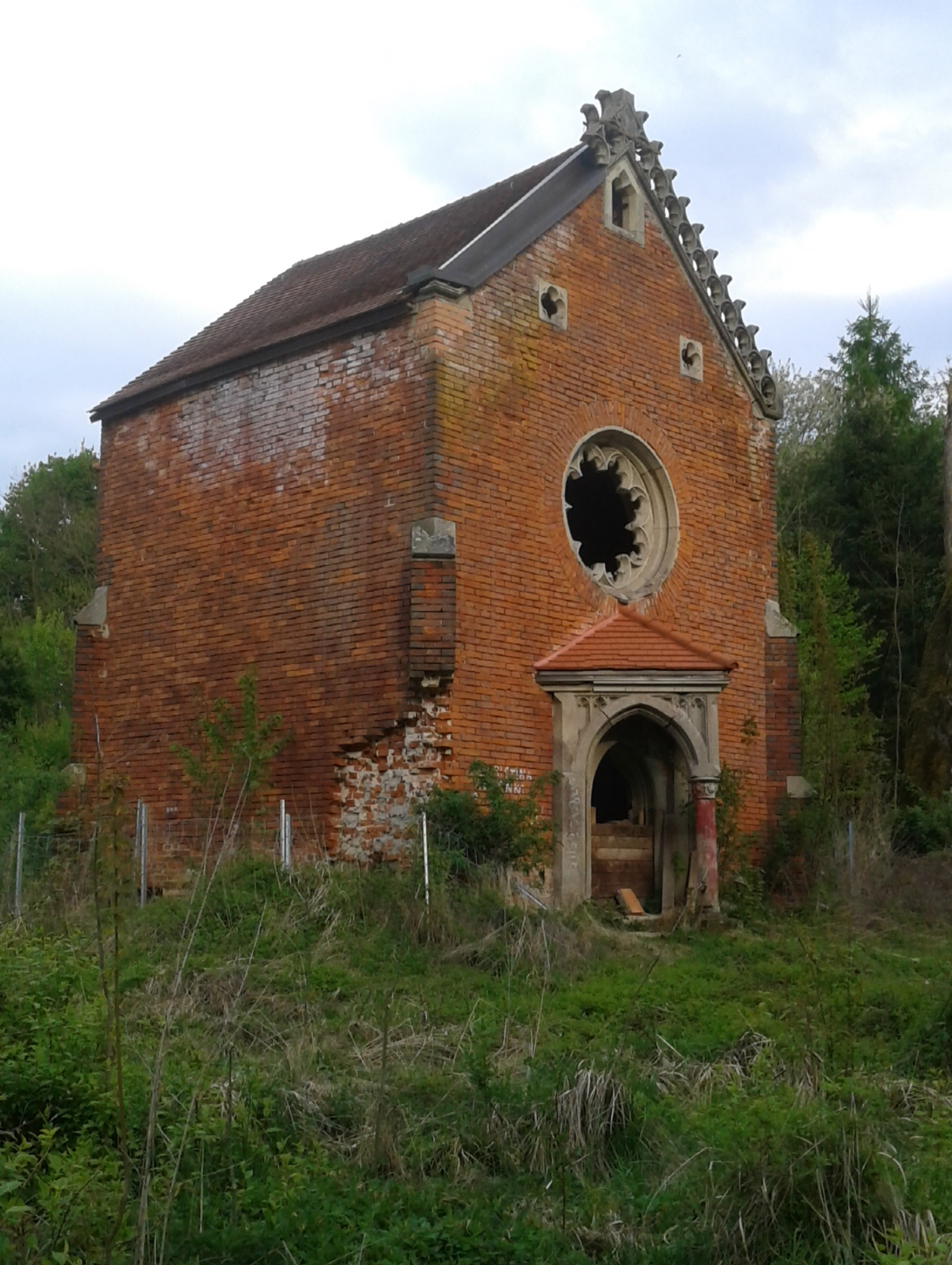 ehemalige Gruftkapelle der Grafen Tauffkirchen-Kleeberg in Trostling bei Ruhsdorf an der Rott, Niederbayern